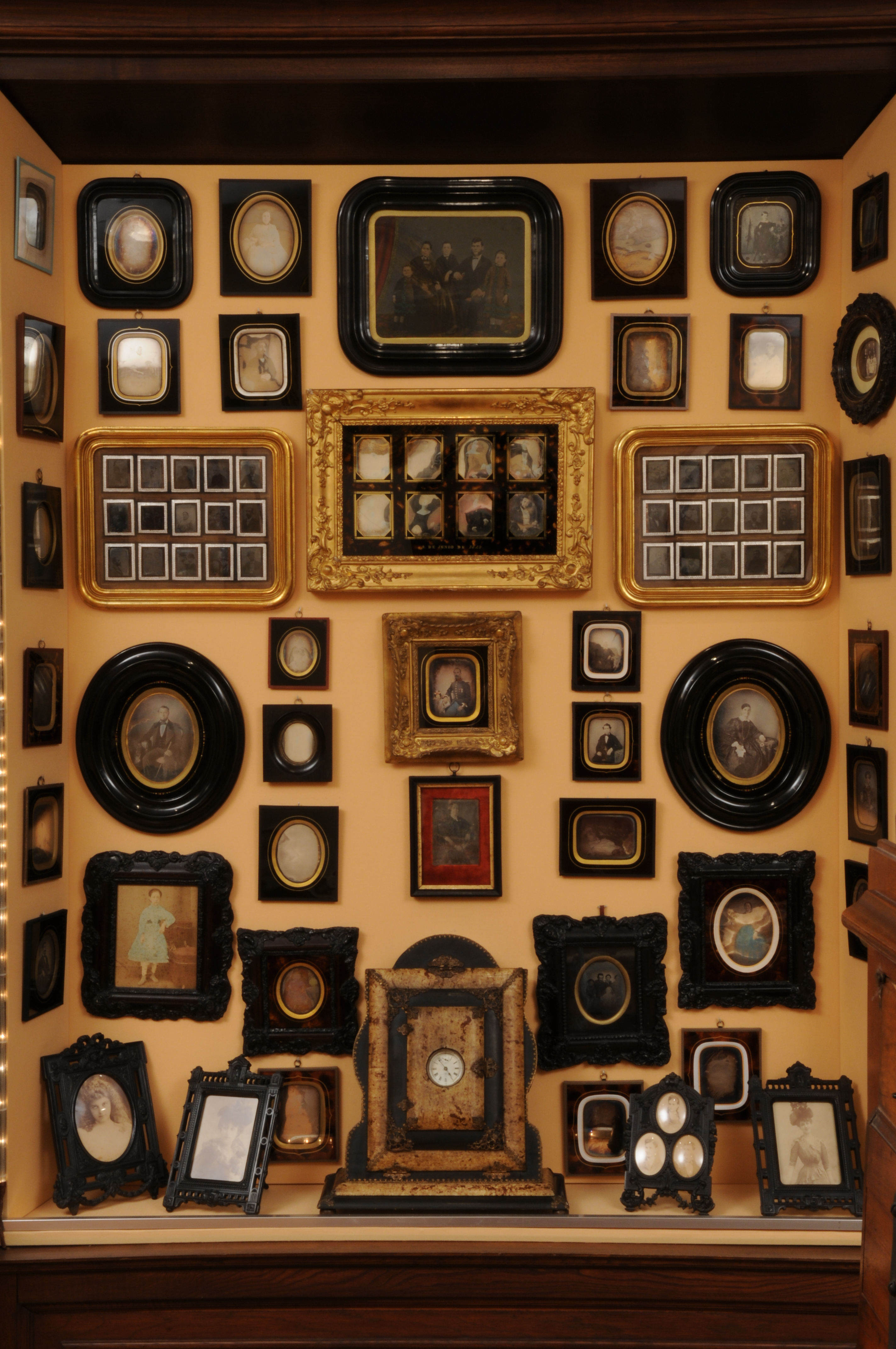 Daguerrotip Gabinet col·leccionista -Fot. R. Muro.JPG